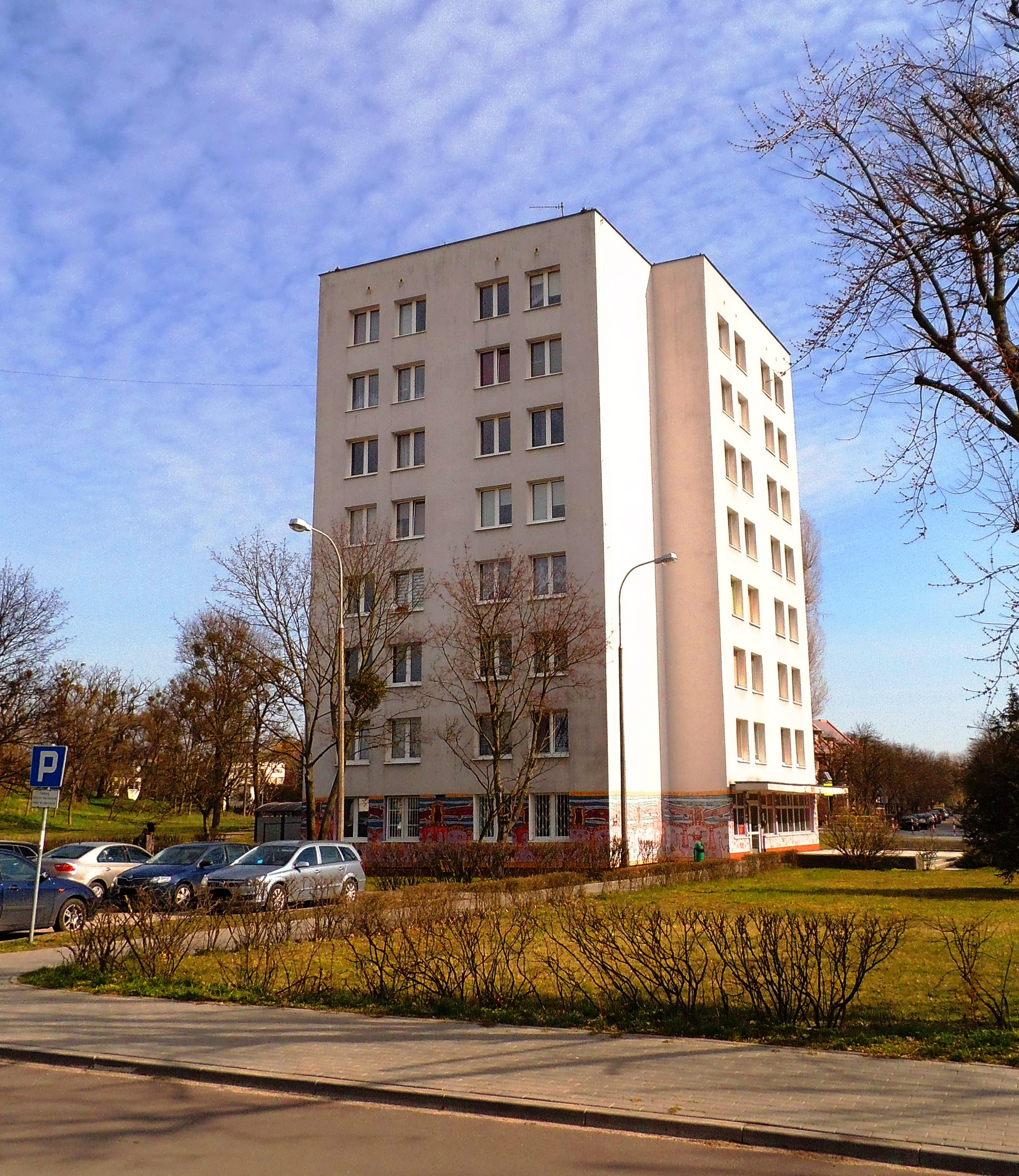 Hotel asystencki UMK Toruń